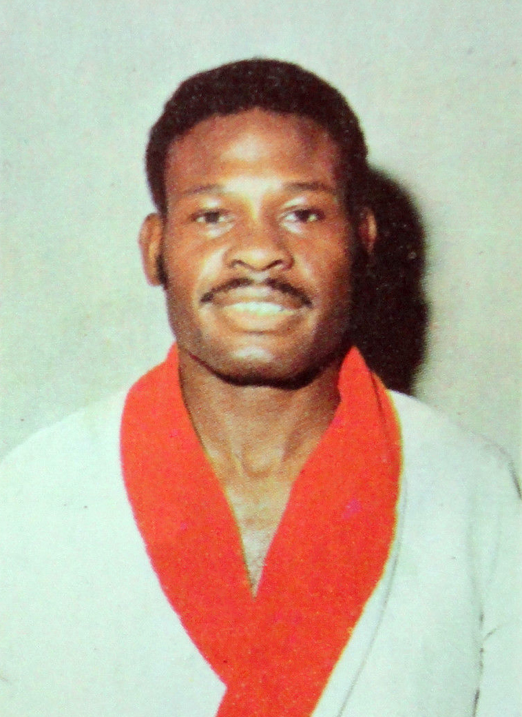 CAMPIONI DELLO SPORT 1970/71-n.284-LITTLE-PUGILATO